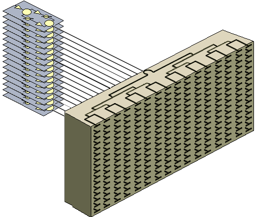 Lineares Array einer Phased Array Antenne